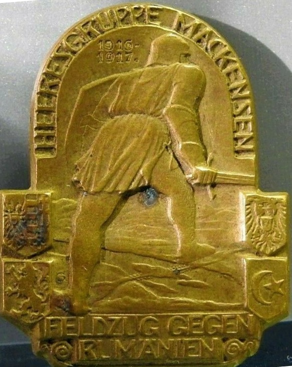 Kappenabzeichen der Heeresgruppe Mackensen